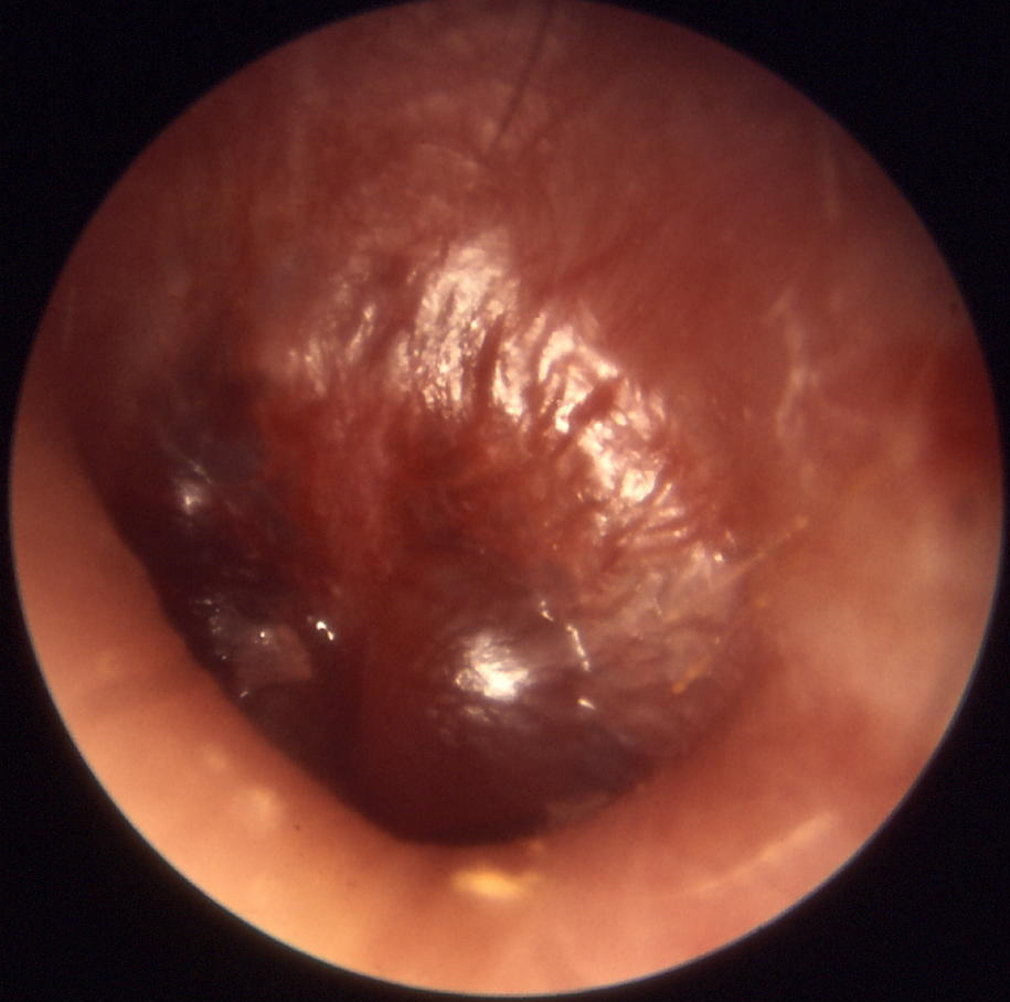 Otitis media acuta - Grippeotitis